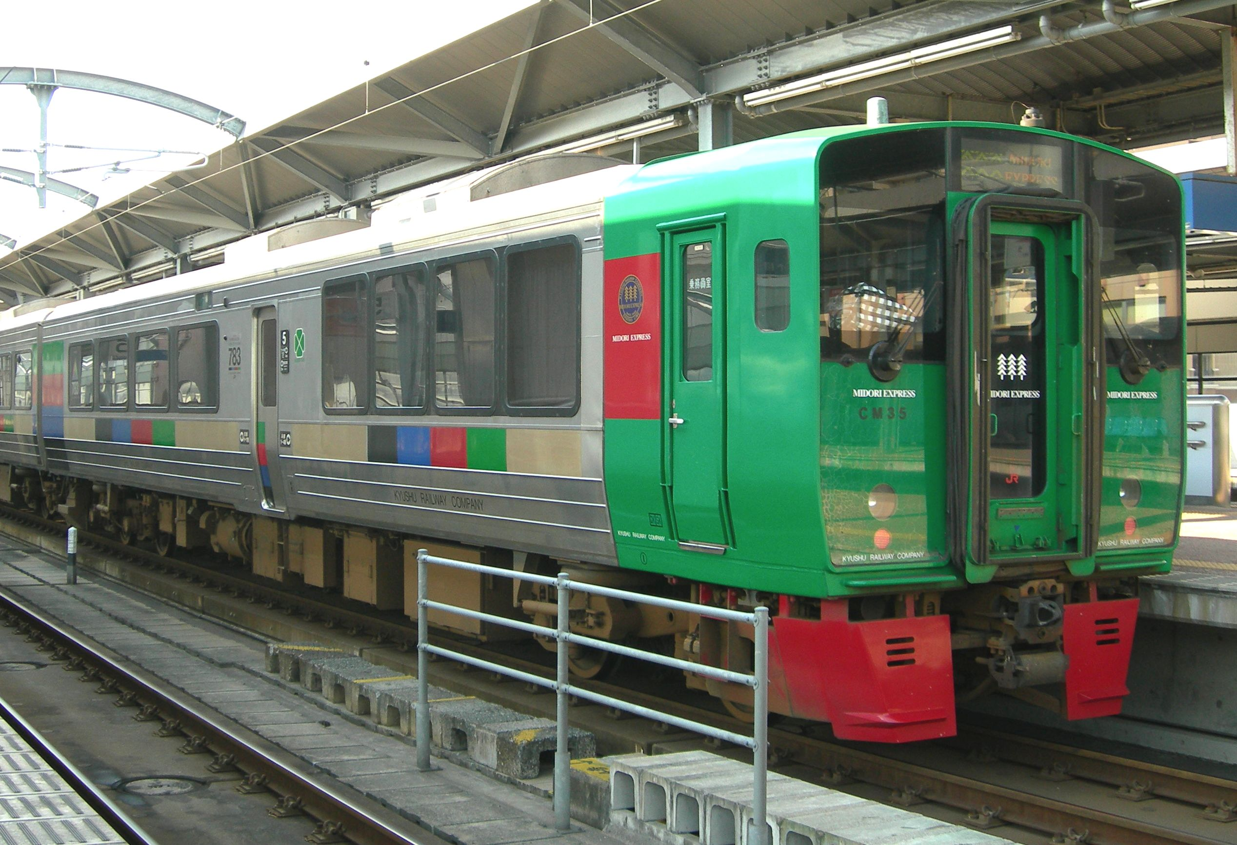 JR九州783系電車クロハ782形407